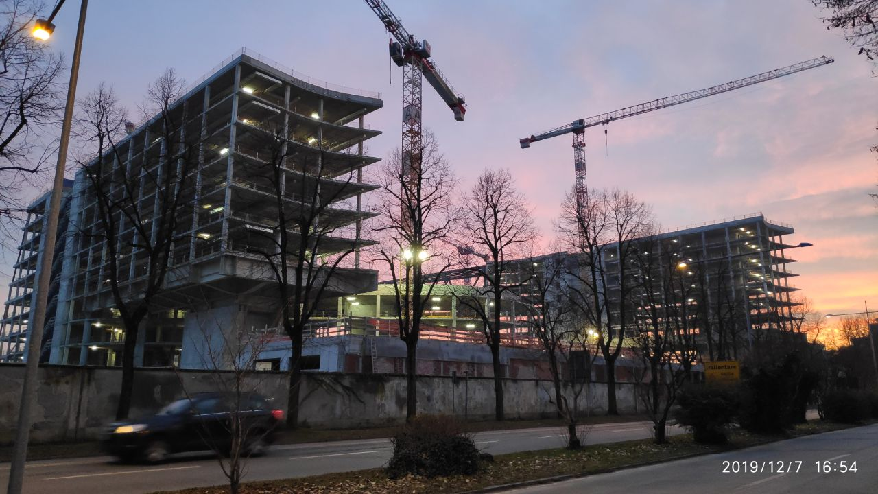 VI Palazzo uffici ENI lato De Gasperi (7 dicembre 2019)